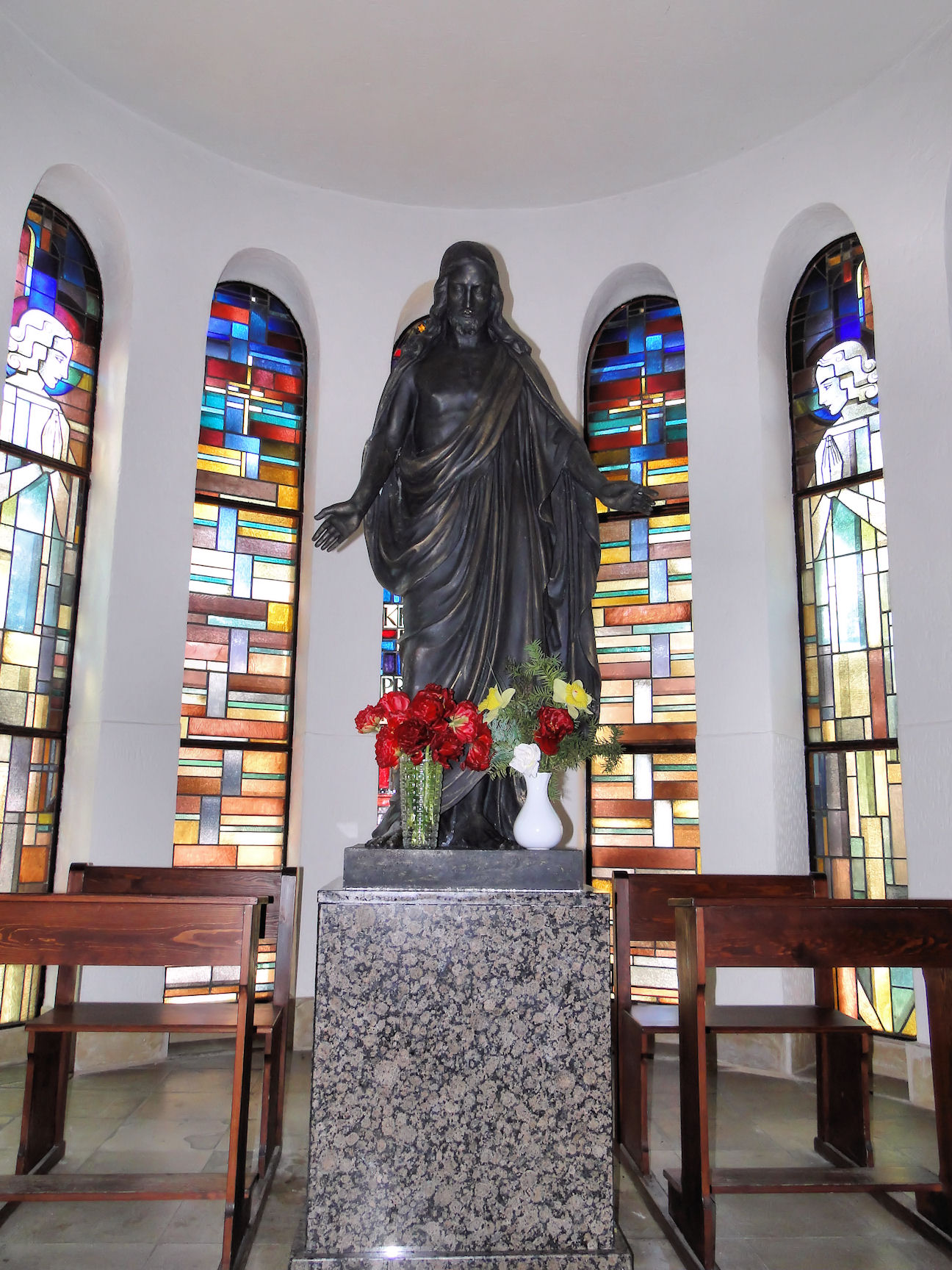 Rzeźba Chrystusa w kruchcie kościoła św. Rodziny w Szczecinie (pierwotnie rzeźba była częścią nagrobka Dewitzów na Cmentarzu Centralnym w Szczecinie).